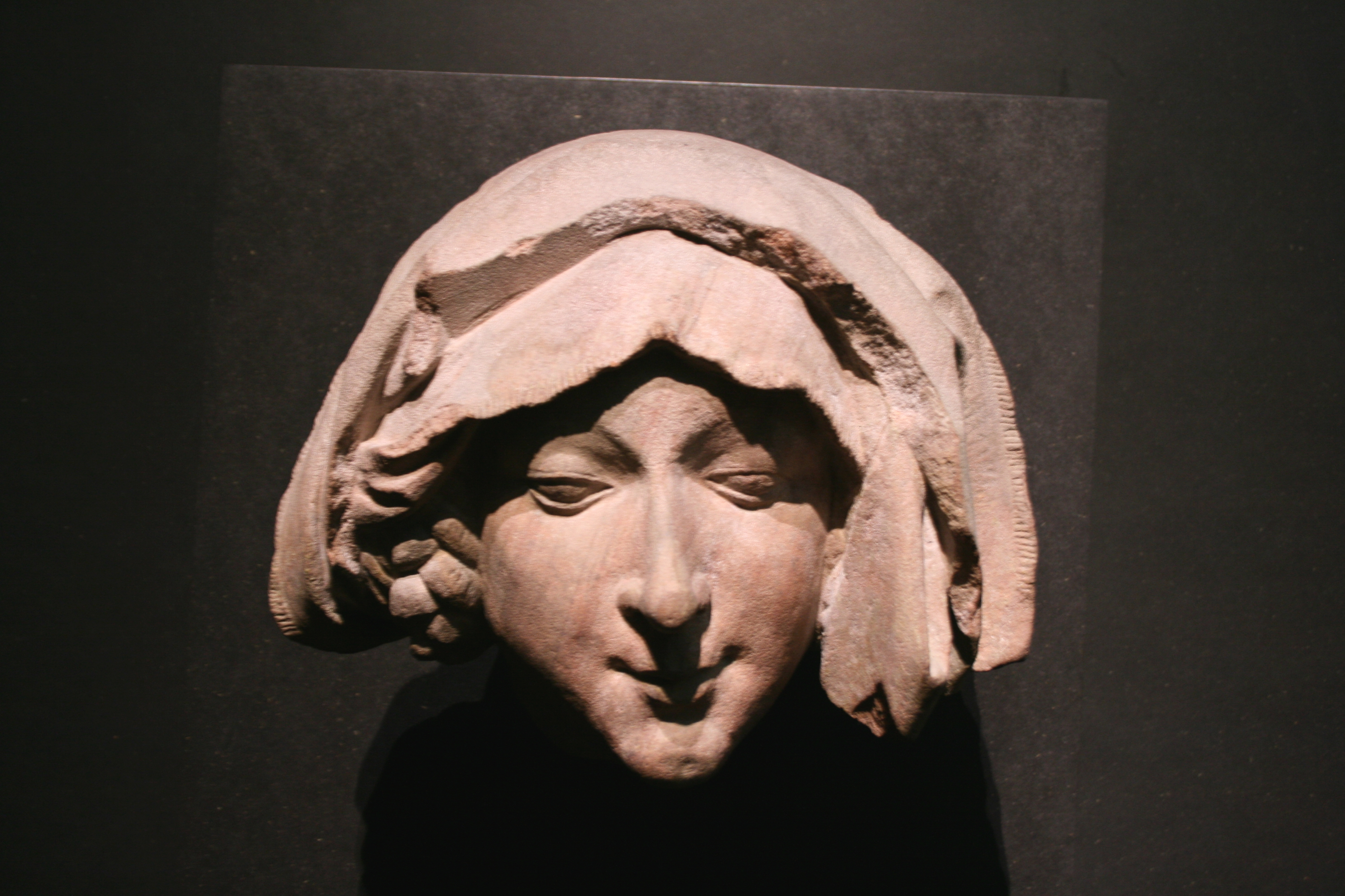 Niclas Gerhaert van Leyden (–1473) Alternative names Niclas Gerhaert van Leyden, Niclaes oder Niklas Gerhaert van oder von LeydenDescriptionDutch sculptorDate of birth/death 1420 / circa 1430 28 June 1473 Location of birth/death Leiden Wiener NeustadtWork location Trier, Straßburg, Passau, ÖsterreichAuthority control : Q33696 VIAF: 96422957 ISNI: 0000 0000 8909 156X ULAN: 500054680 LCCN: n86055259 WGA: GERHAERT VAN LEYDEN, Nicolaus WorldCat creator QS:P170,Q33696